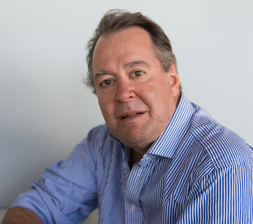 Göran Ragnerstam på Kulturhuset i Stockholm den 11 juni 2015.